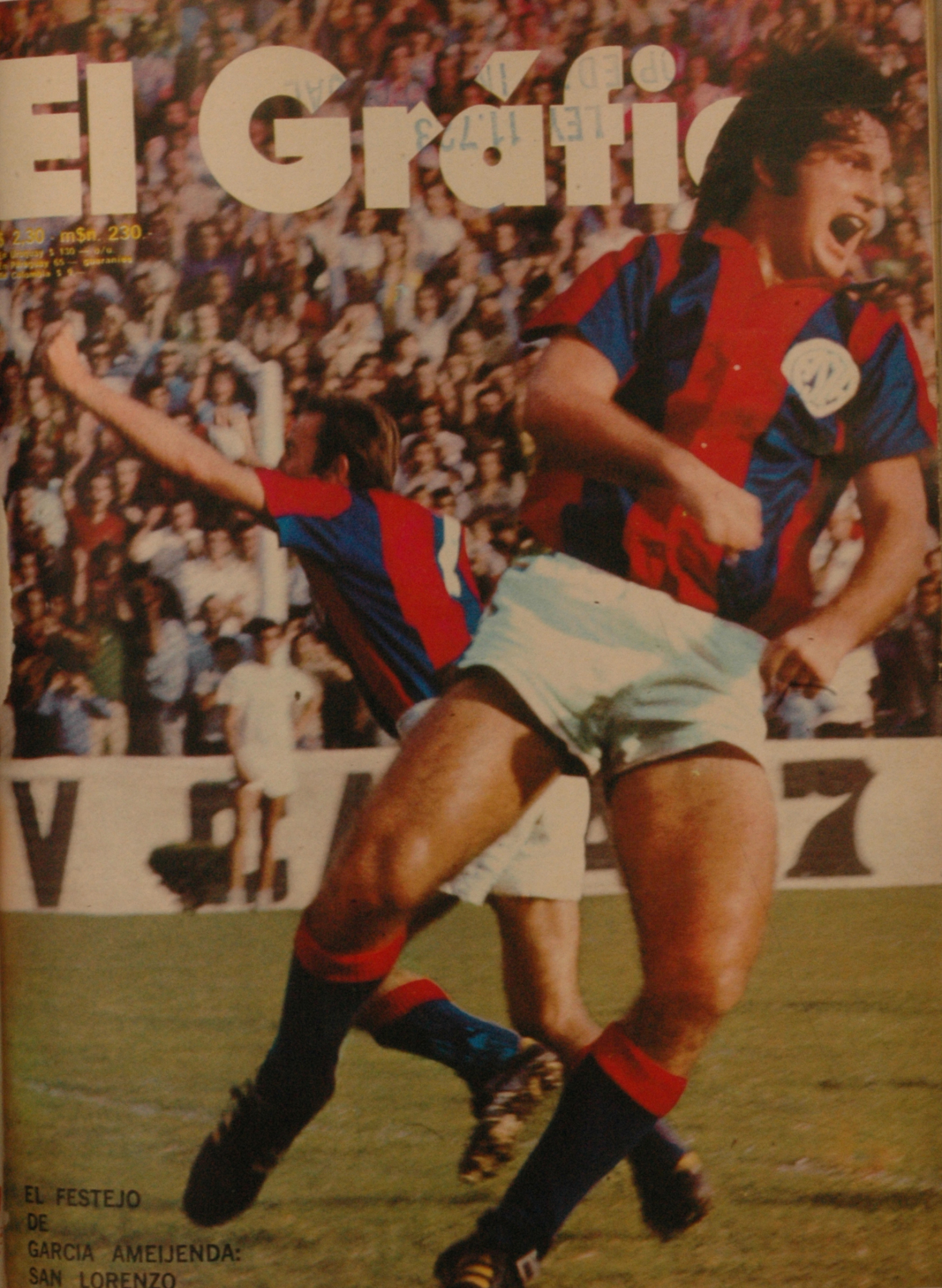 El Grafico del 16 de Mayo de 1972. Edicion 2745